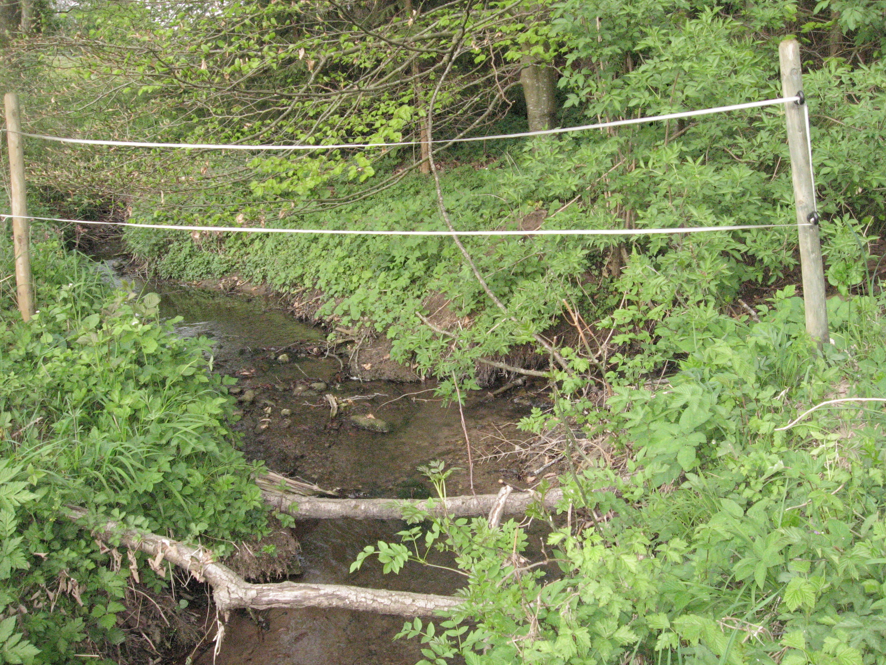 Mündung des Sauerbergbachs (von rechts) in den Avenbach (von links hinten) vor der Westspitze des Sauerbergs, etwa einen Kilometer SW von Bühlertann- Fronrot, knapp auf Bühlerzeller Gemarkung.